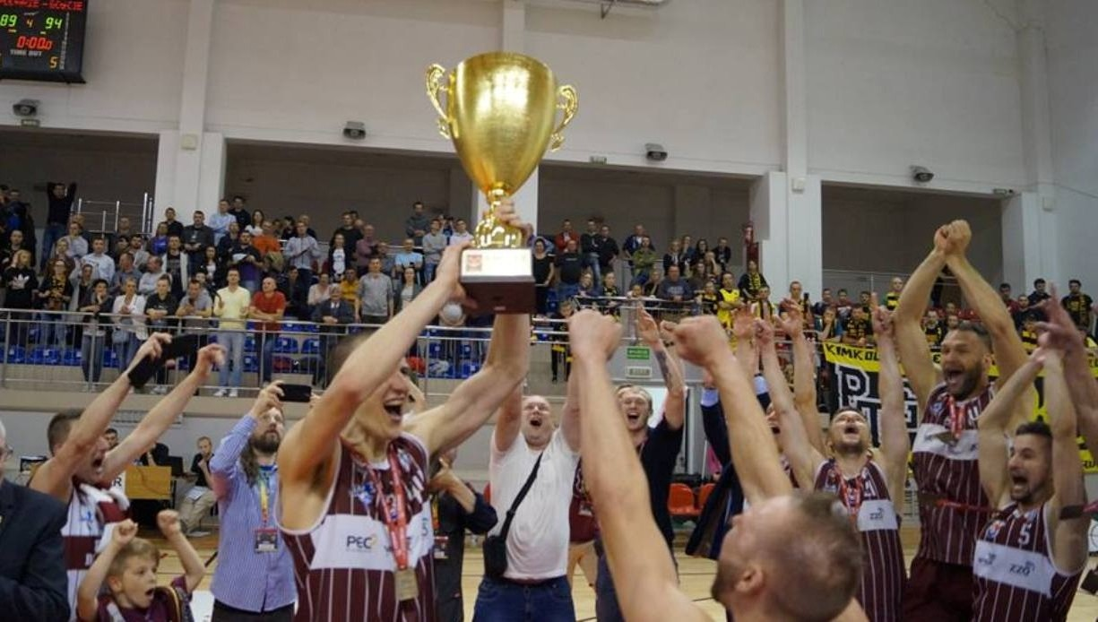 Spójnia z pucharem, awans do ekstraklasy (17.05.2018)